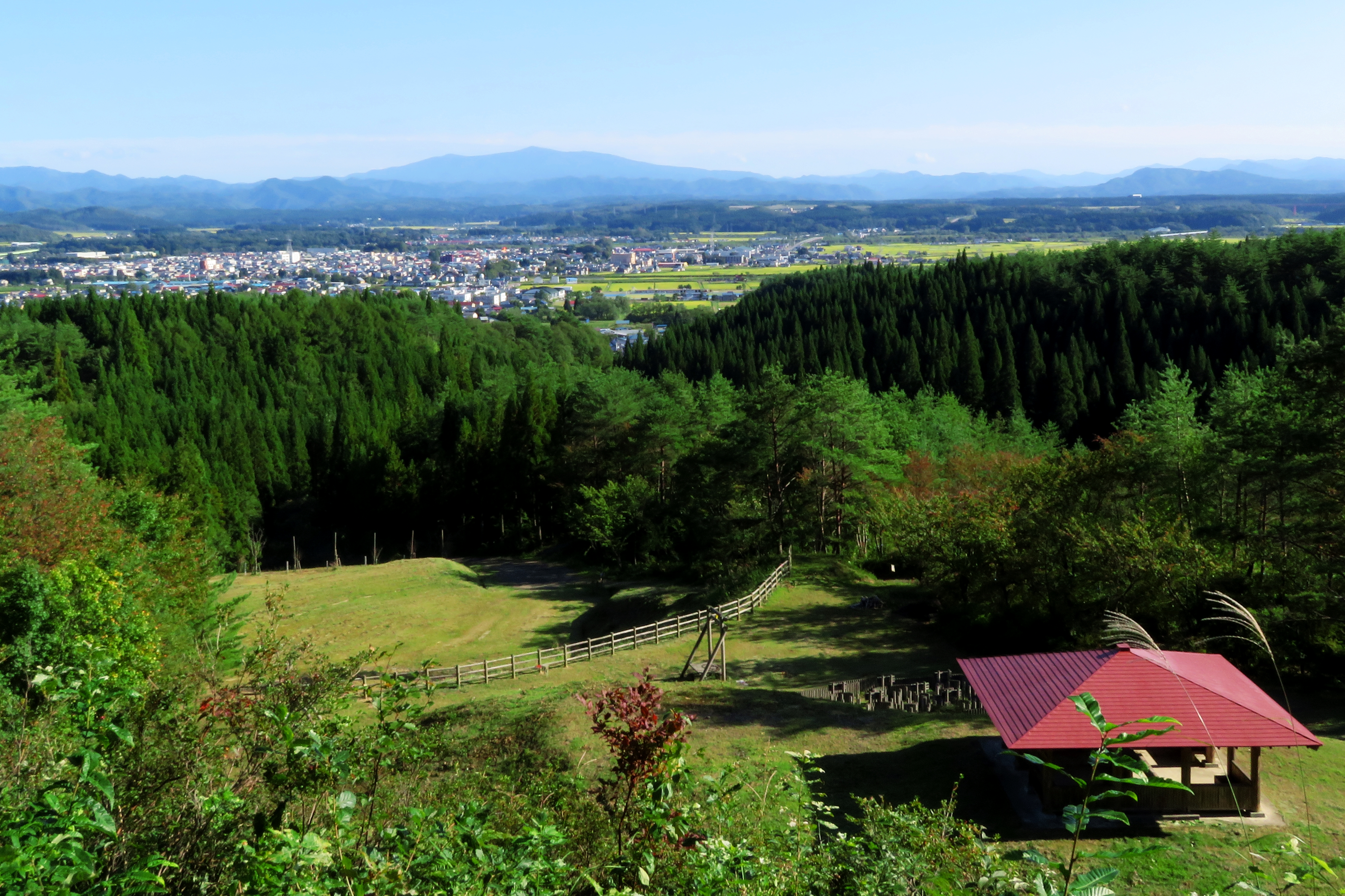 慶祝森林自然公園から望む鷹巣盆地 Canon PowerShot SX720 HS